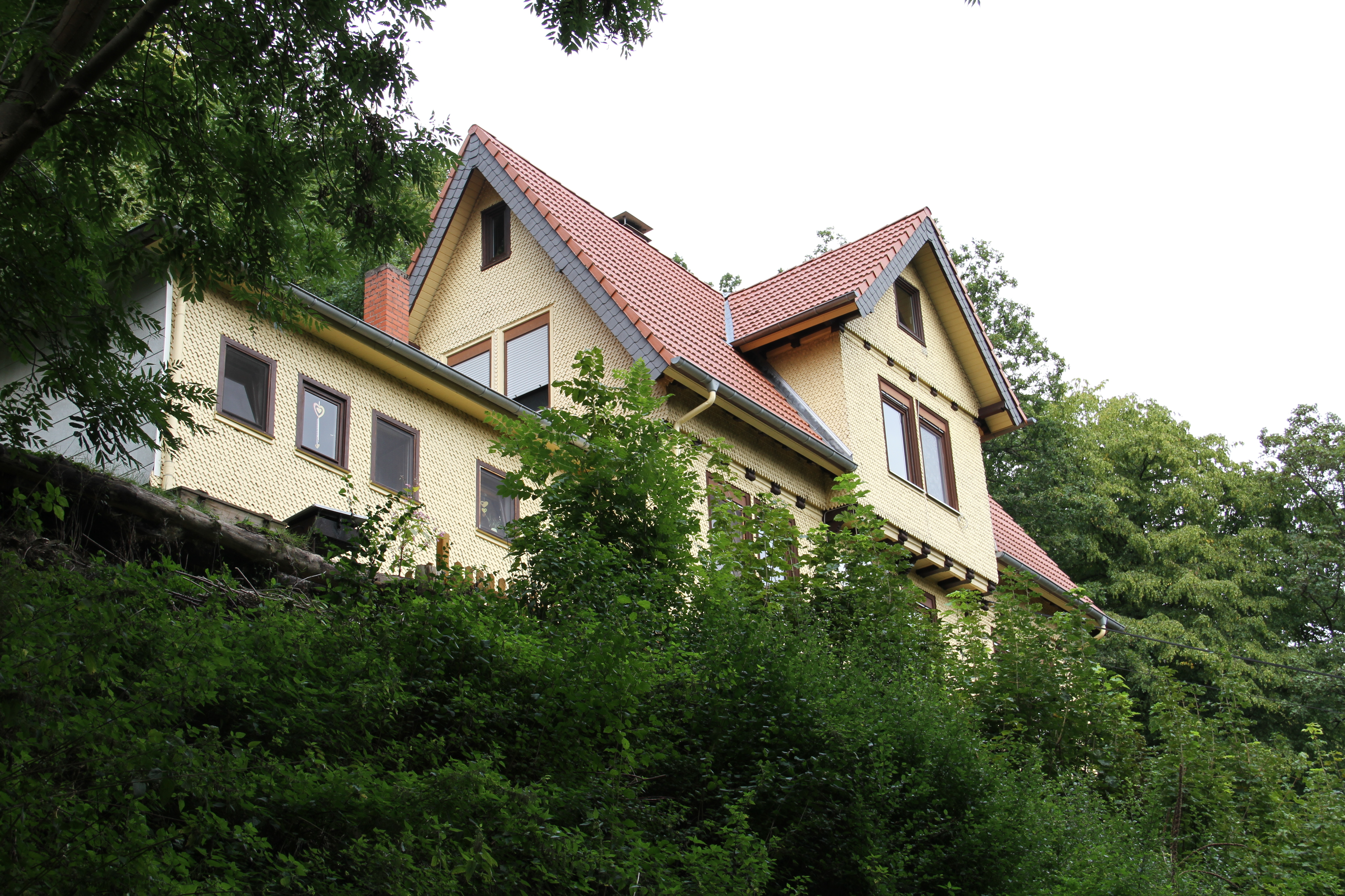 Dieses Foto entstand im Rahmen des Projekts Wiki Loves Monuments Mittelhessen, das aus dem Community-Projektbudget von Wikimedia Deutschland e. V. gefördert wurde.